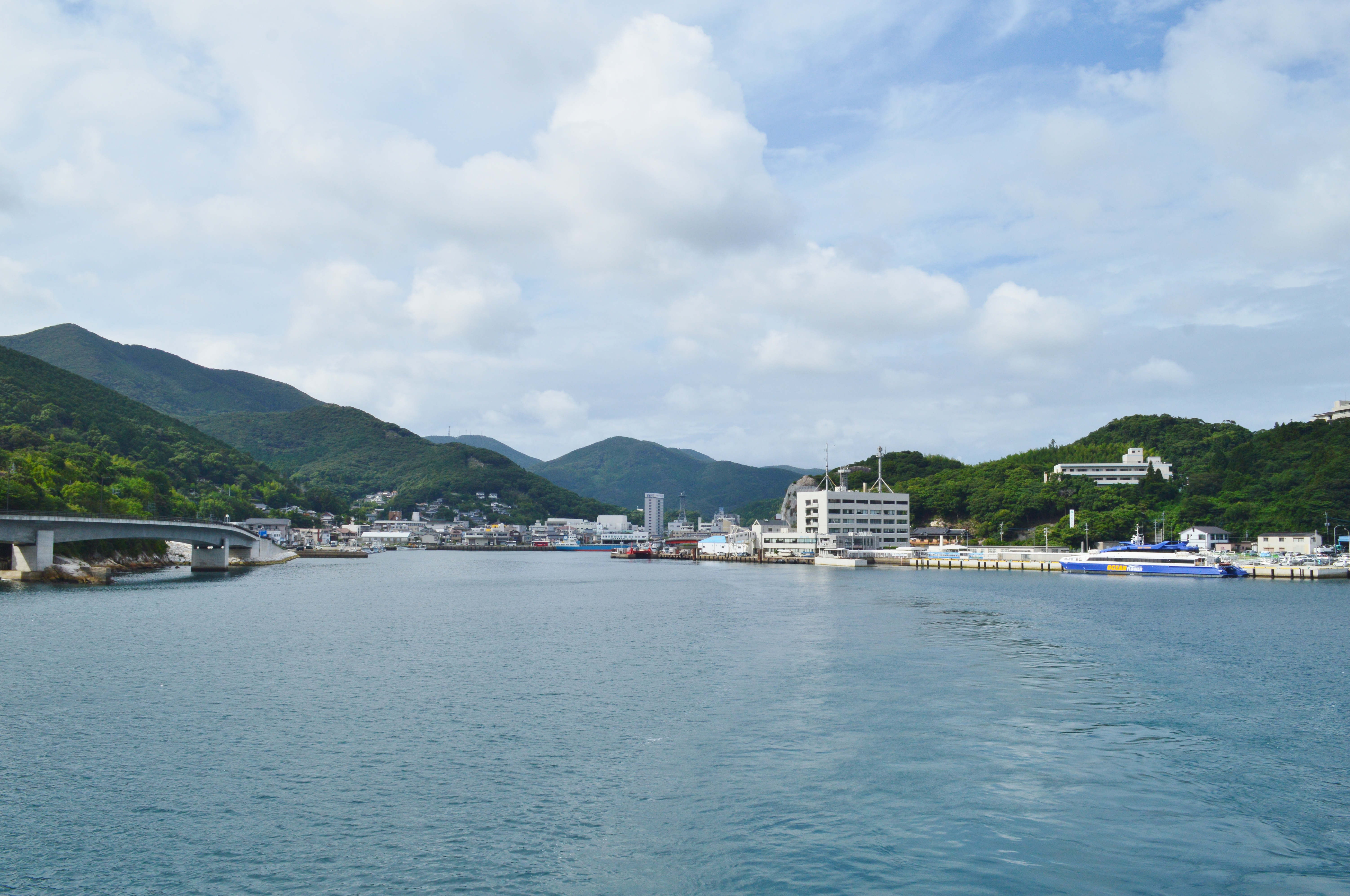 対馬島 厳原湾